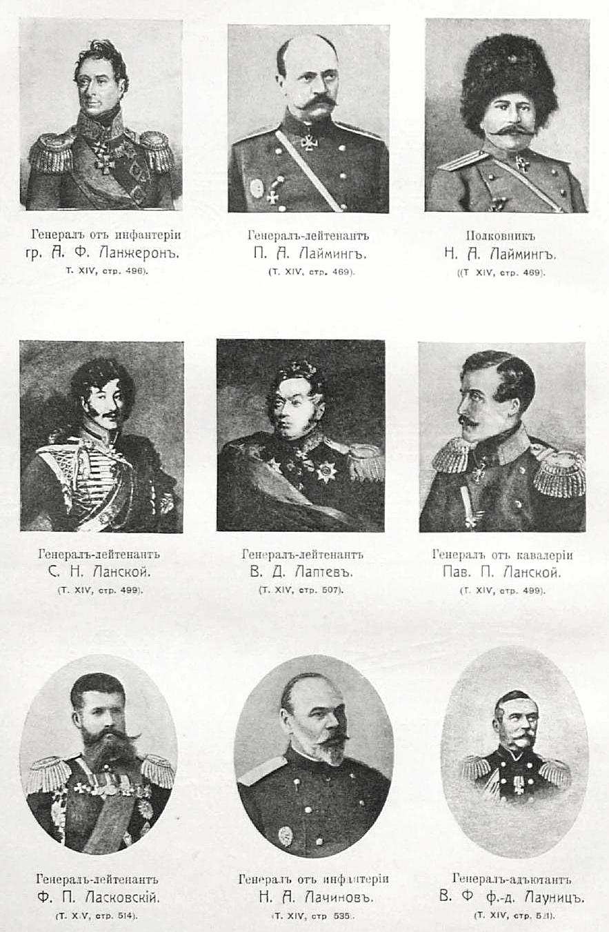 Генералы Российской империи. Эти портреты были использованы для иллюстрирования статей «Ланжерон, Александр Федорович, граф» (цветная версия), «Лайминг» (полная версия 1 и полная версия 2), «Ланские» (цветная версия), «Лаптев, Василий Данилович» (цветная версия), «Ласковские», «Лачинов, Николай Александрович» и «Лауниц» (полная версия) опубликованных в четырнадцатом томе «Военной энциклопедии», который был издан книгоиздательским товариществом И. Д. Сытина в 1914 году в столице Российской империи городе Санкт-Петербурге. Более подробное описание к этом рисункам можно прочесть в указанных выше статьях на сайте Русской Викитеки.